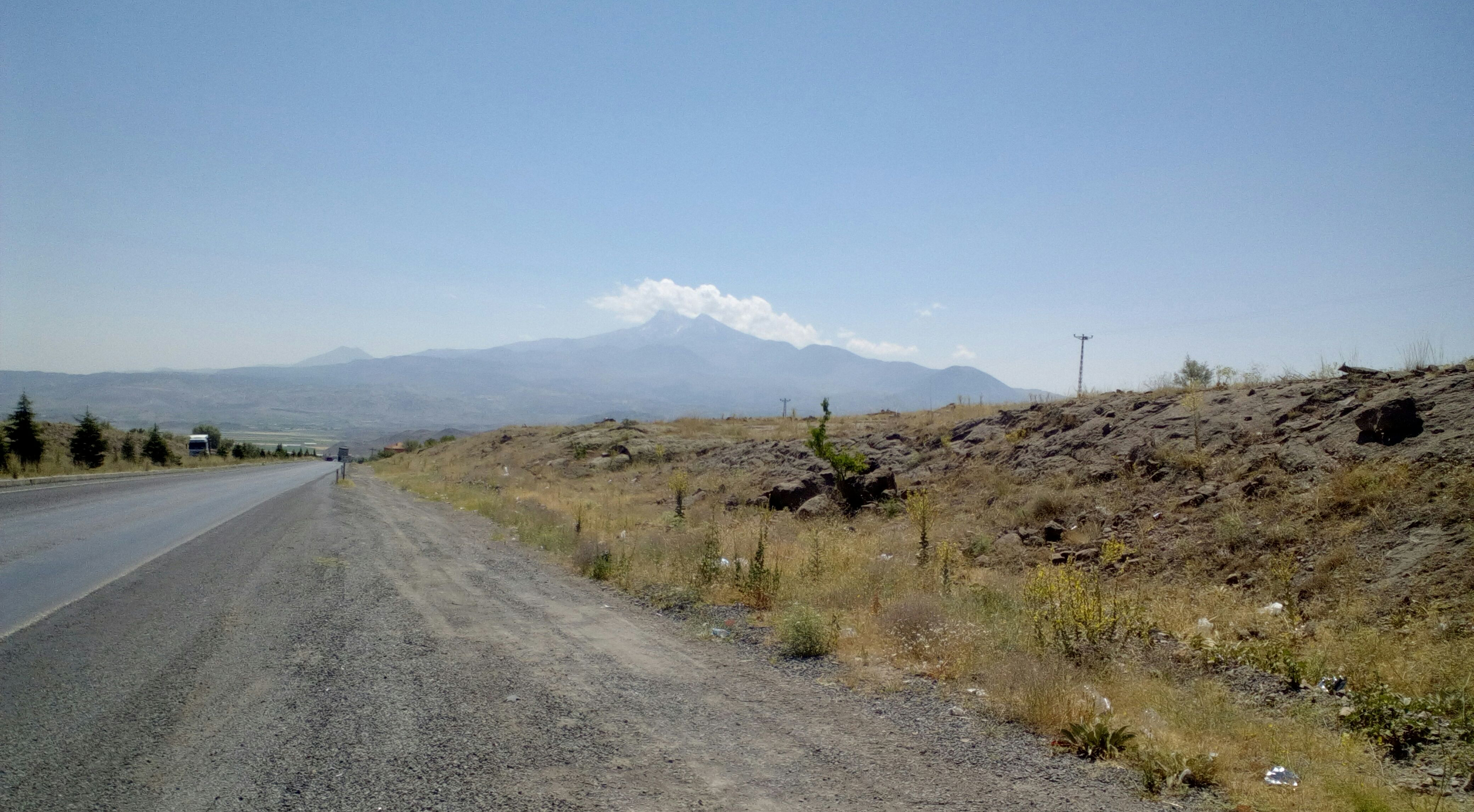 Az Erciyes Dağı látképe az Ürgüp és Kayseri közti D300-as főútról (Garipçe, Törökország)